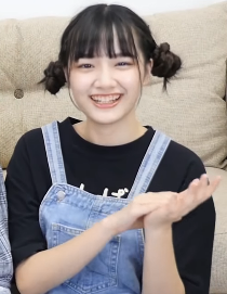 兎遊です。